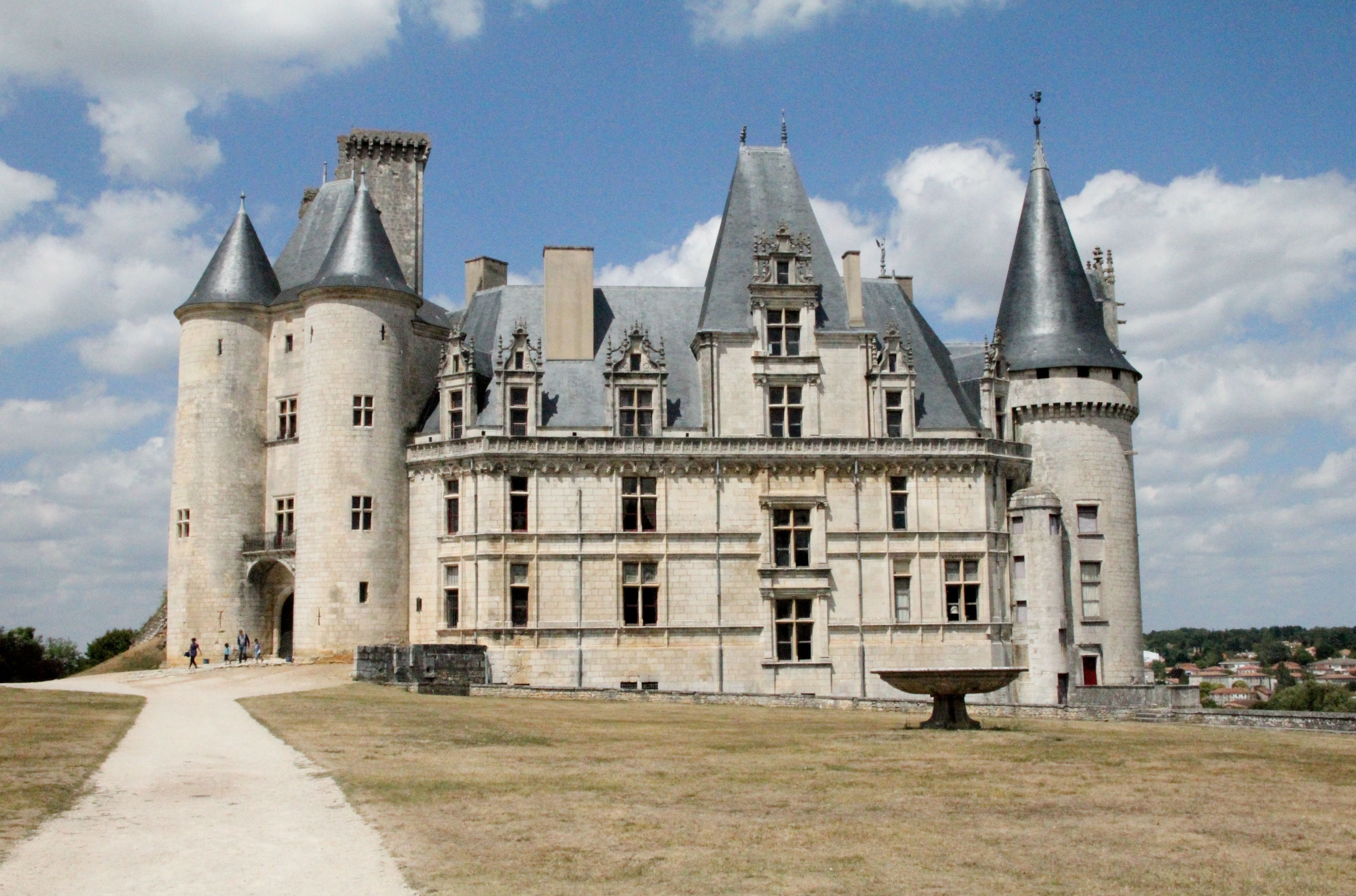 Château de La Rochefoucauld, Charente, France